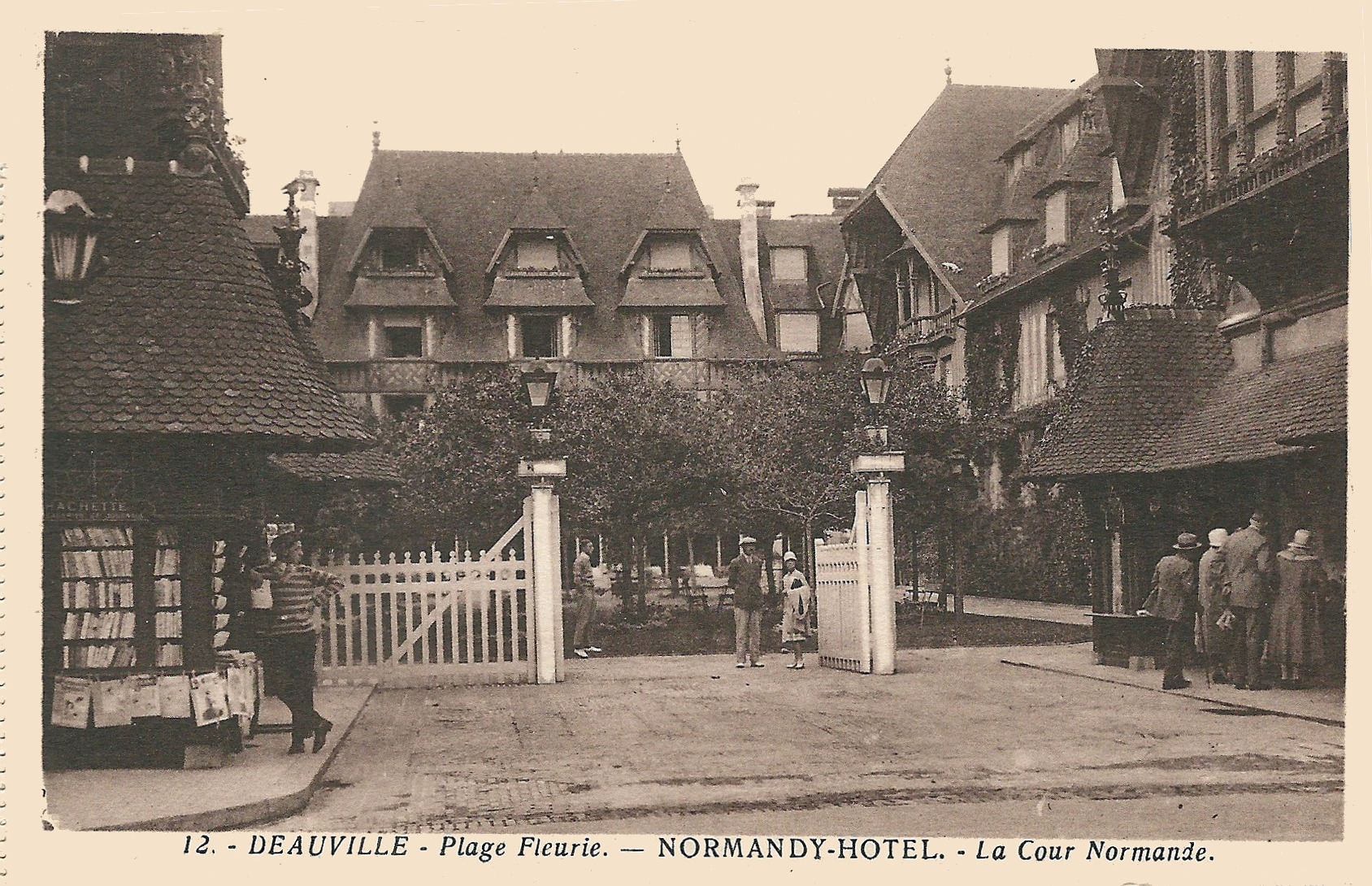 Carte postale ancienne (vers 1928-1930) des lieux de villégiatures de Deauville (Calvados, France)